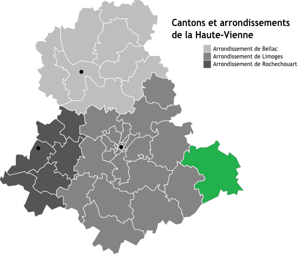 Canton d'Eymoutiers, Limousin, France en Carte des arrondissements de la Haute-Vienne